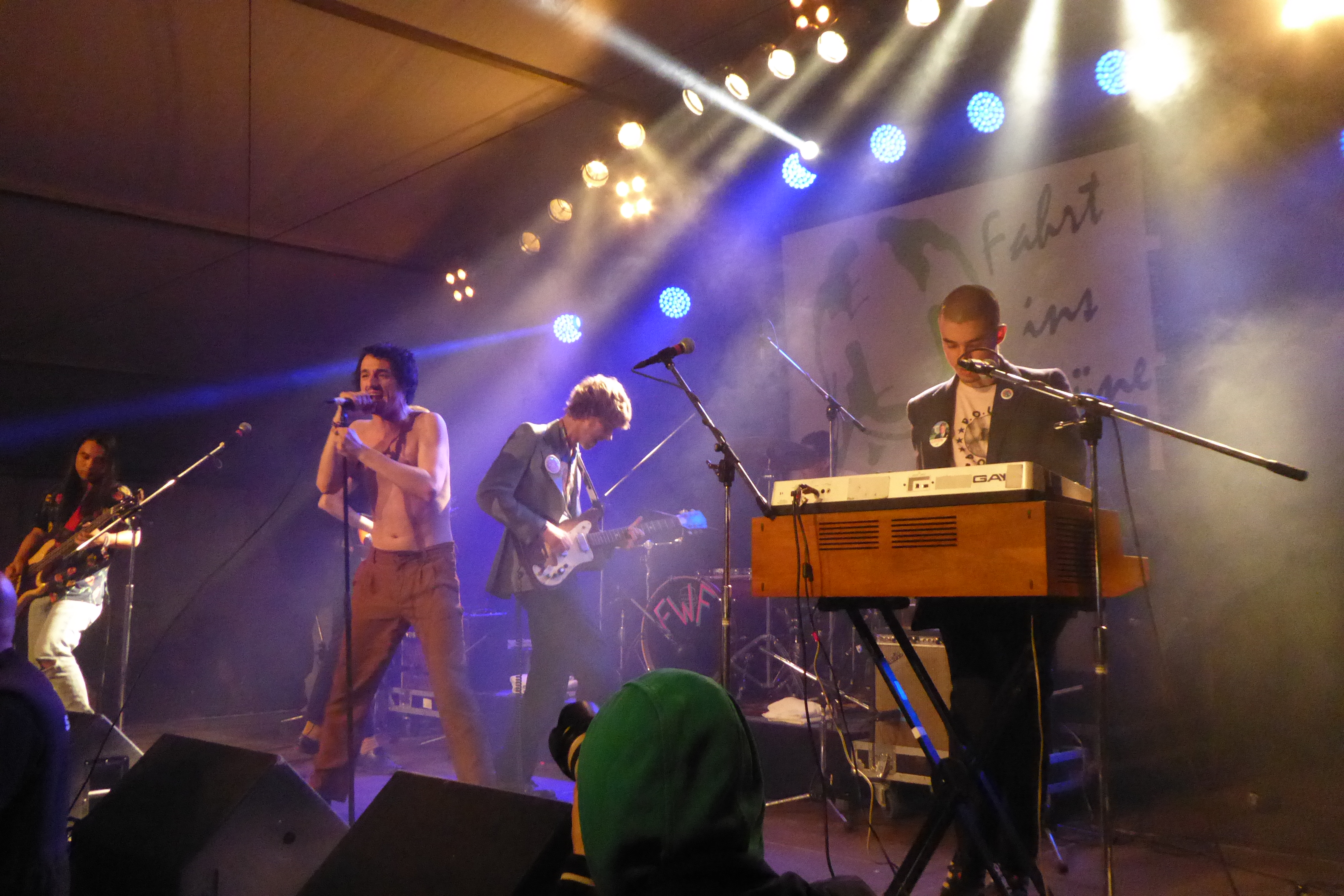 Fat White Family beim Immergut Festival 2016